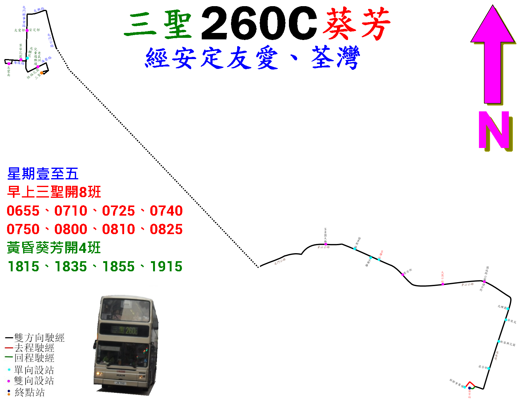 中文（香港）: 九巴260C線的走線圖